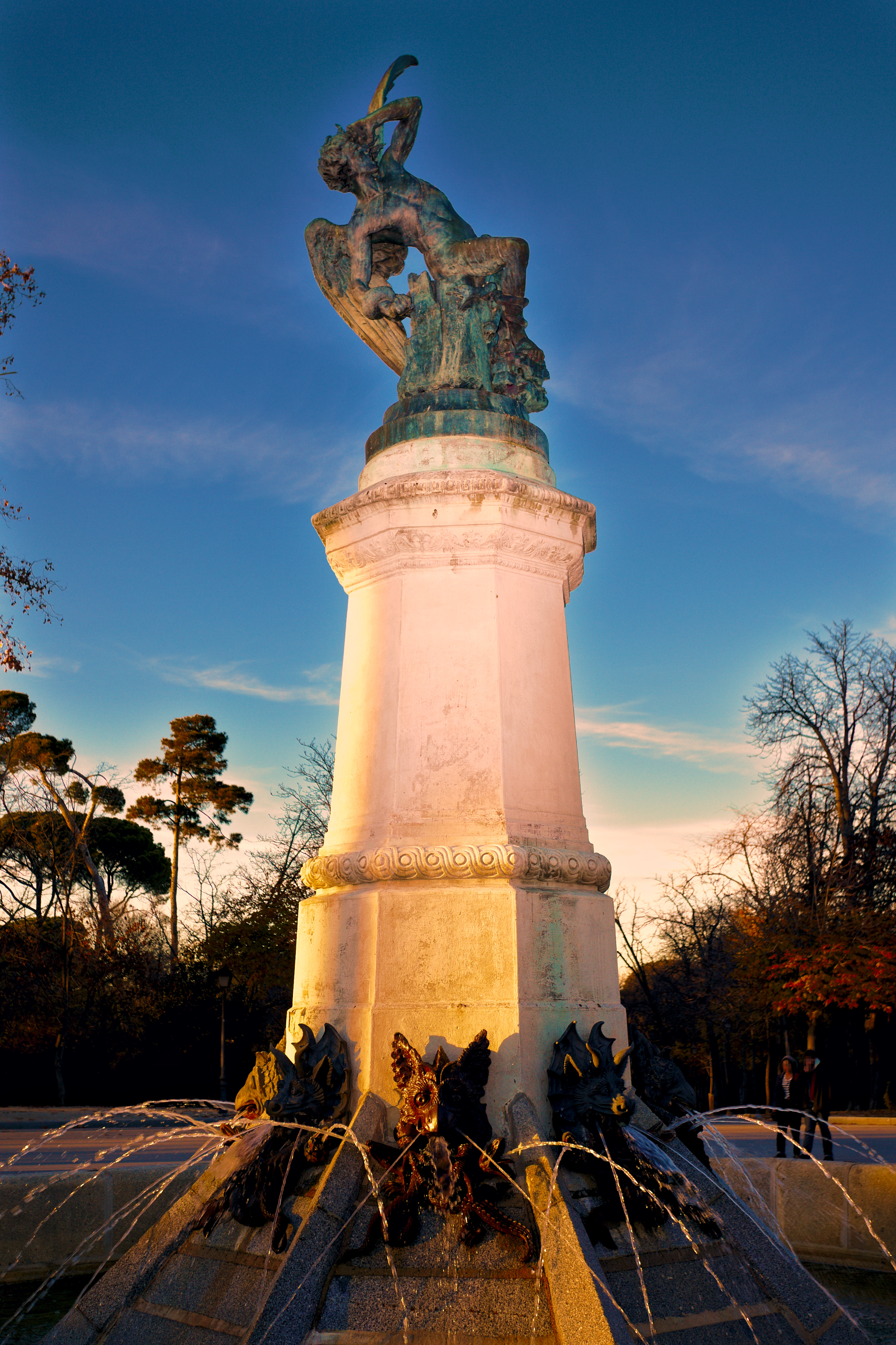 El Ángel Caído (R. Bellver, 1877), en Madrid (Espanha).